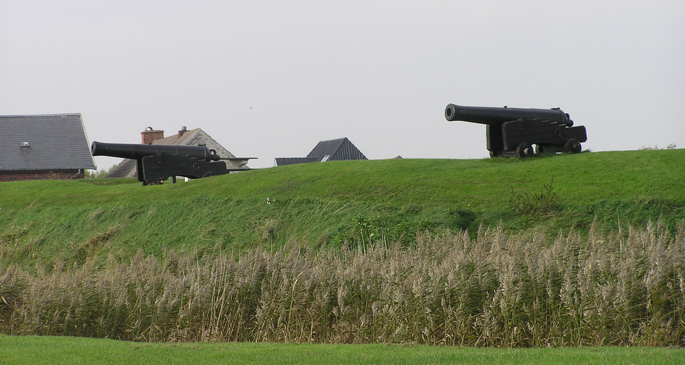 Hals Skanse, Danmark